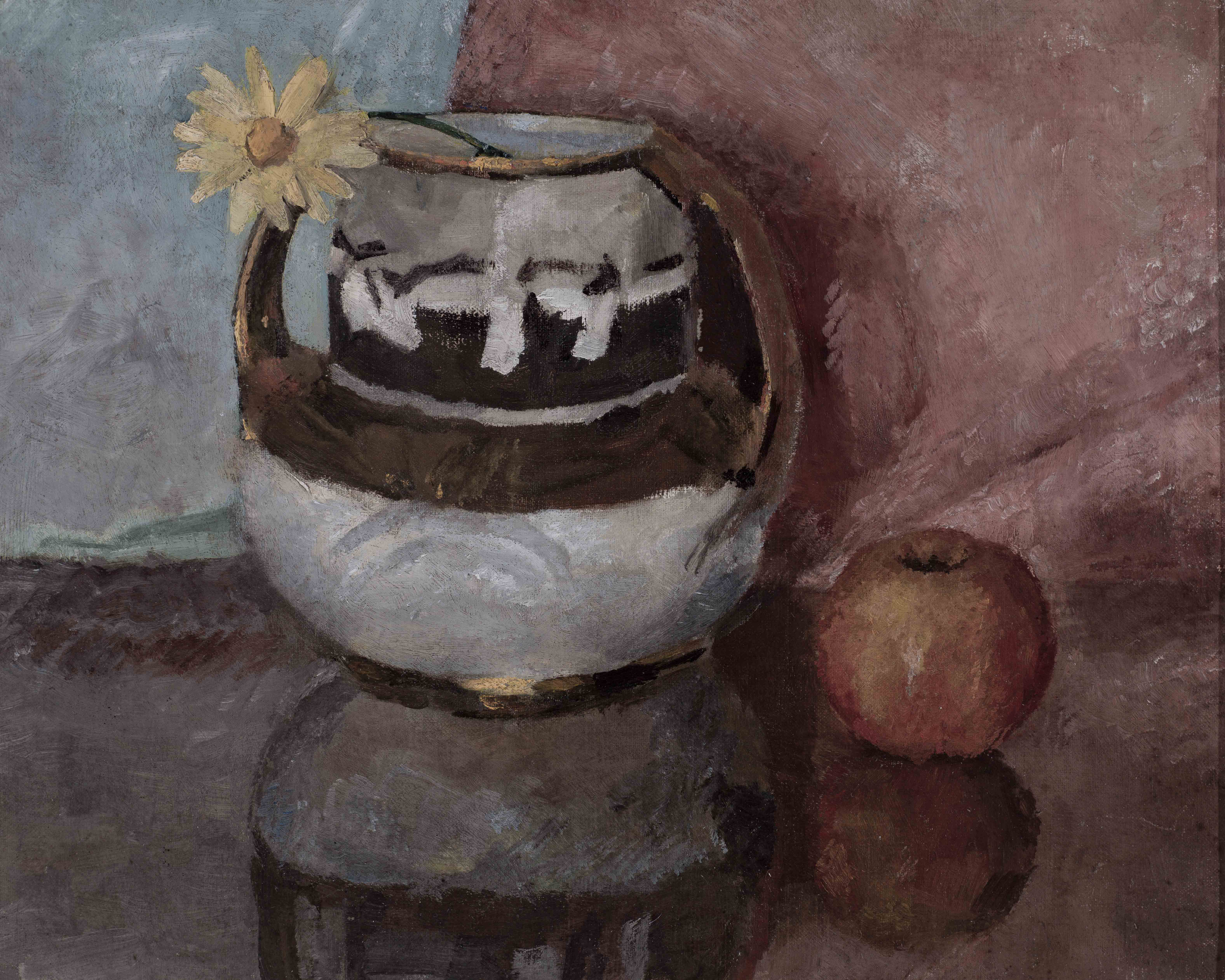 Stillleben, Apfel mit Vase: 120x73,5; Öl auf Leinwand.